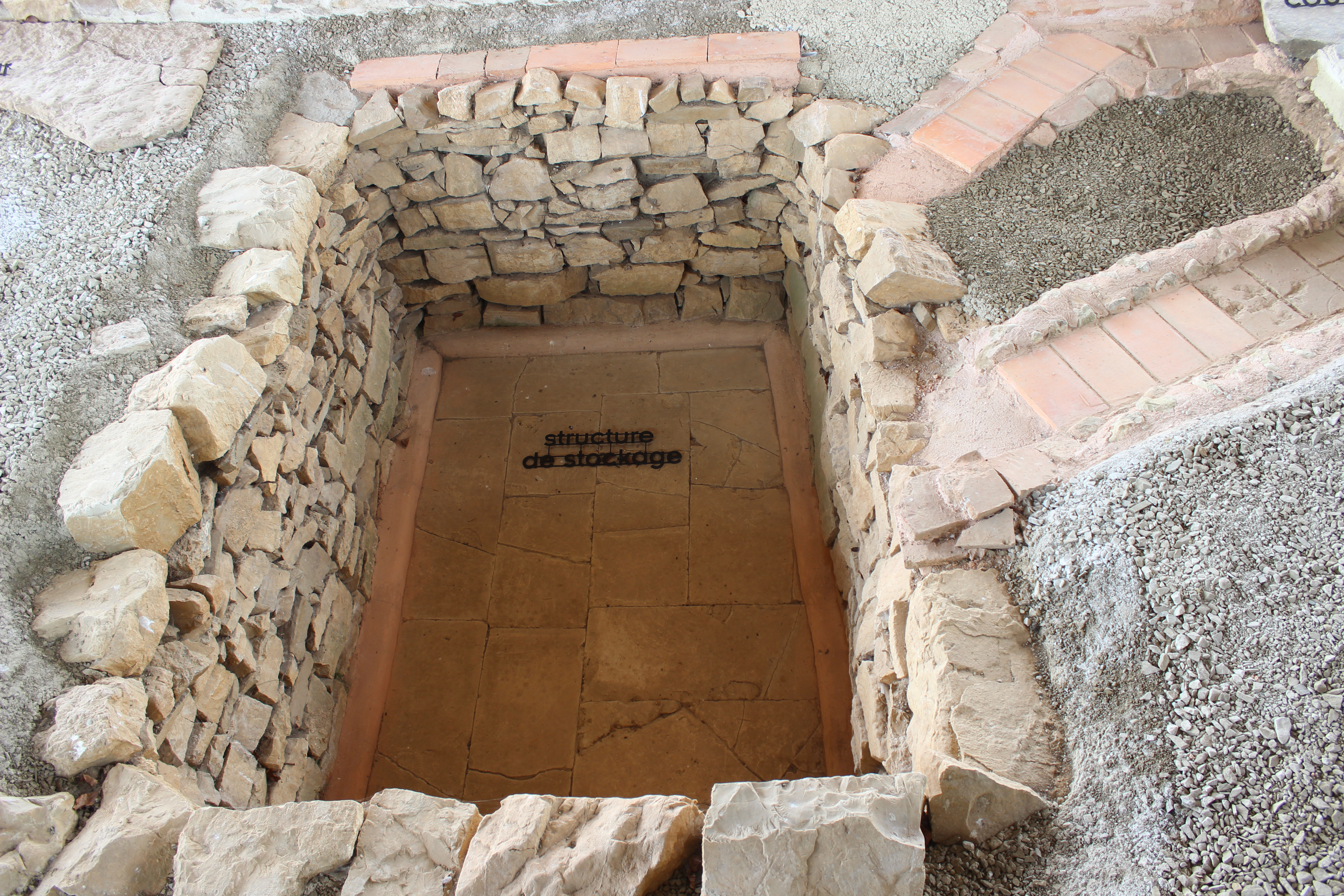 maison à la cour en U de Vieux la romaine